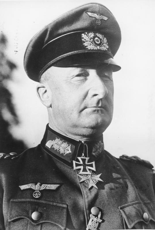 Scherl Bilderdienst General der Infanterie von Both, der mit dem Ritterkreuz des Eisernen Kreuzes ausgezeichnet wurde. PK-Kempe-Pressebildzentrale herausg. 2.10.1941